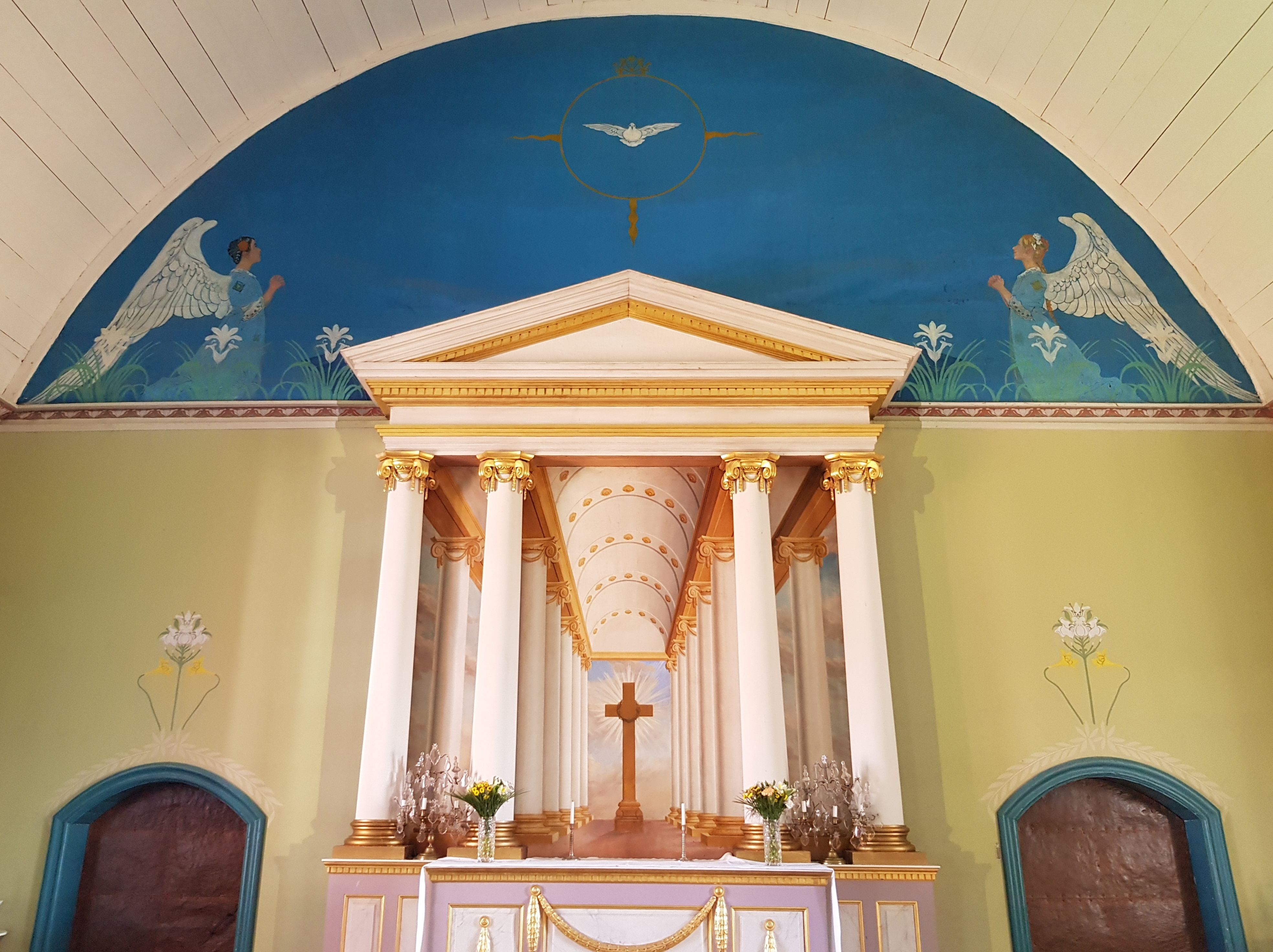 Carl Larssons muralmålning i Sundborns kyrka i Dalarna.